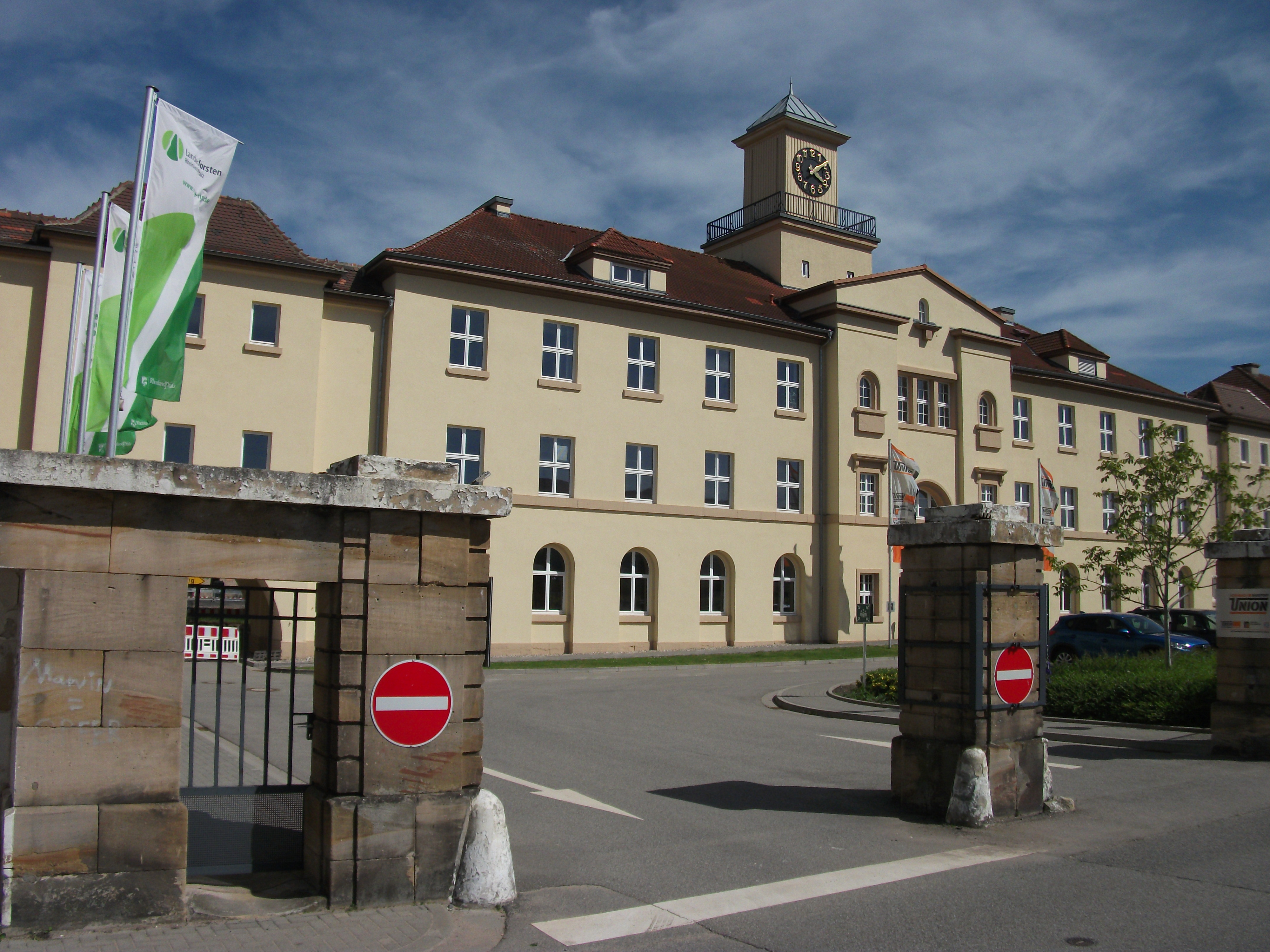 Ehemalige Turenne-Kaserne in Neustadt an der Weinstraße nach der Restaurierung, Zustand 2013